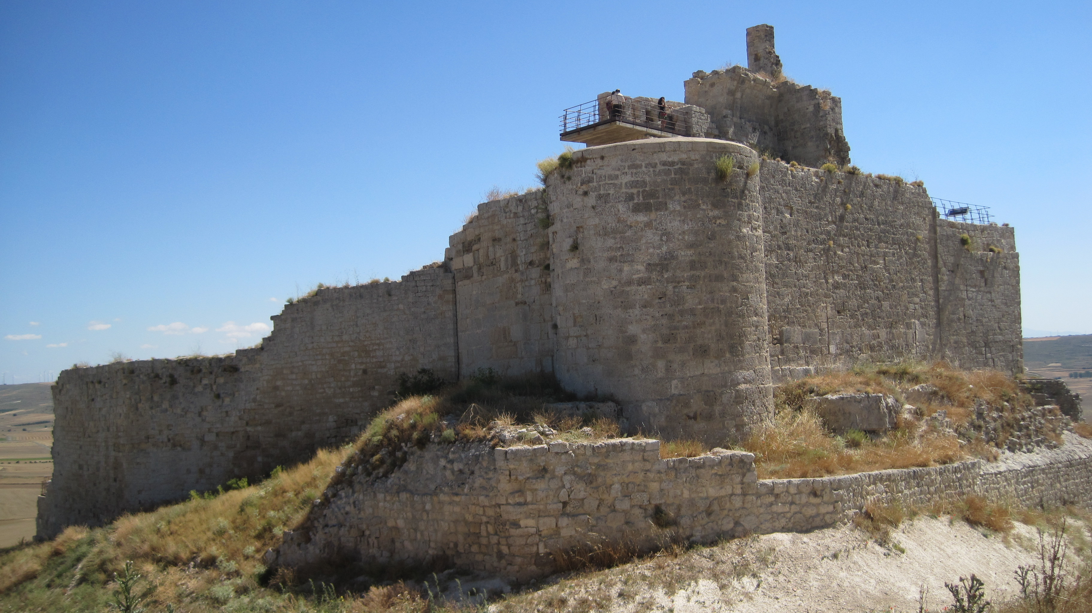 Vista exterior del castillo de Castrojeriz (Burgos, España).